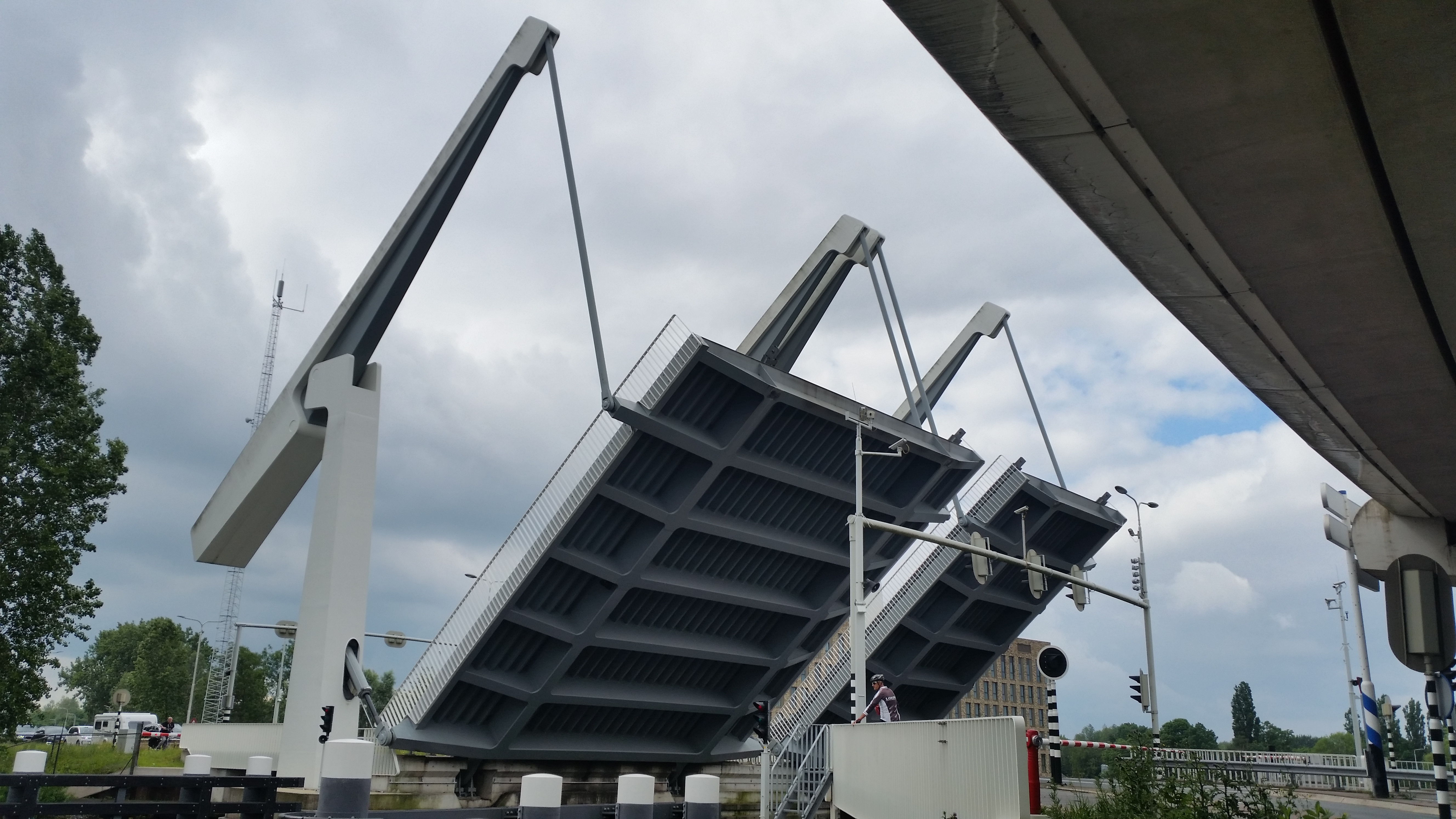 Bosrandbrug in geopende stand